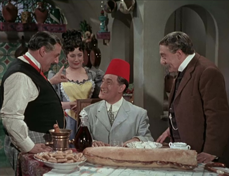 Scena del film Un turco napoletano (1953)